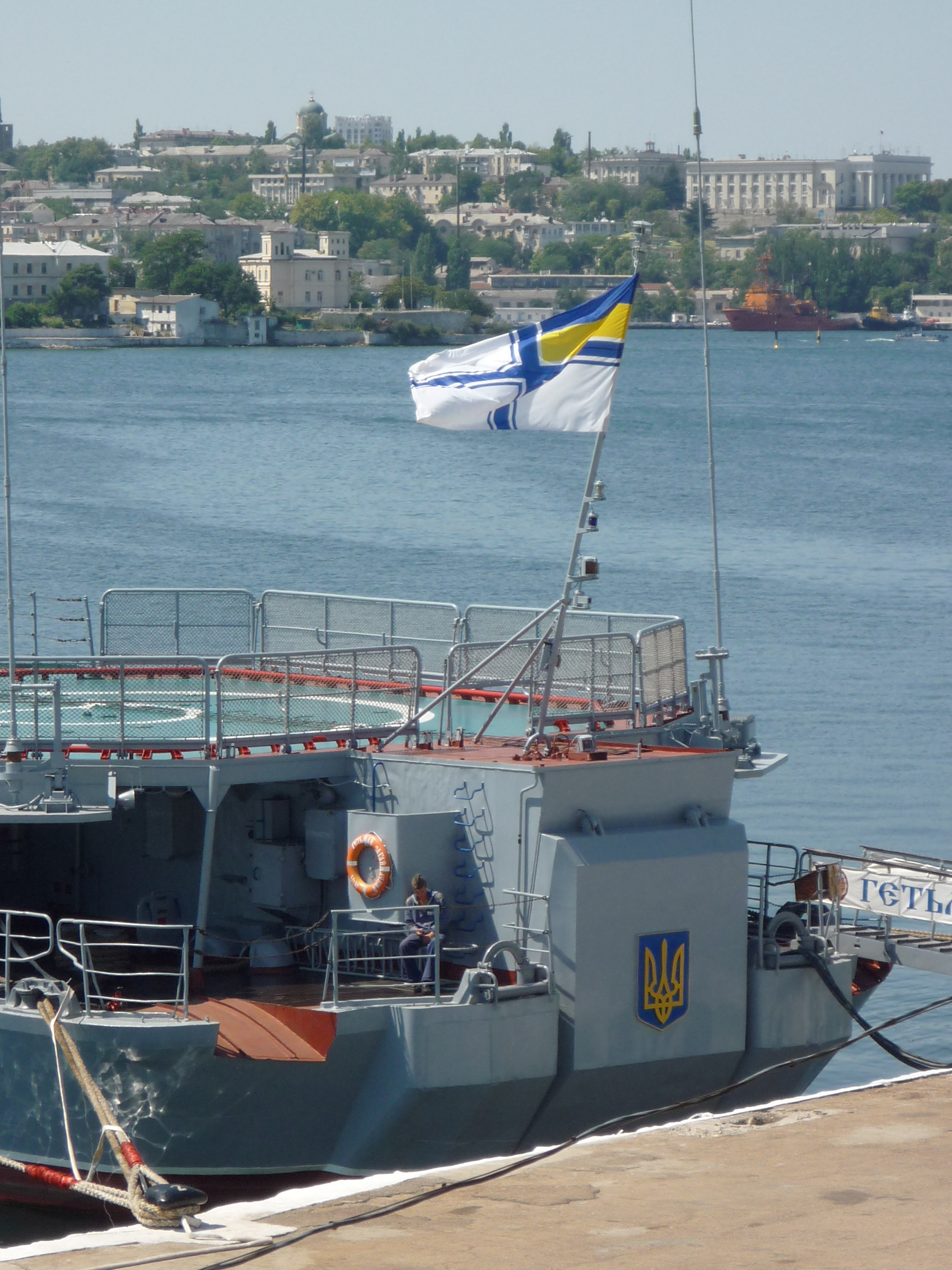 Фрегат Гетман Сагайдачный, вид с кормы.